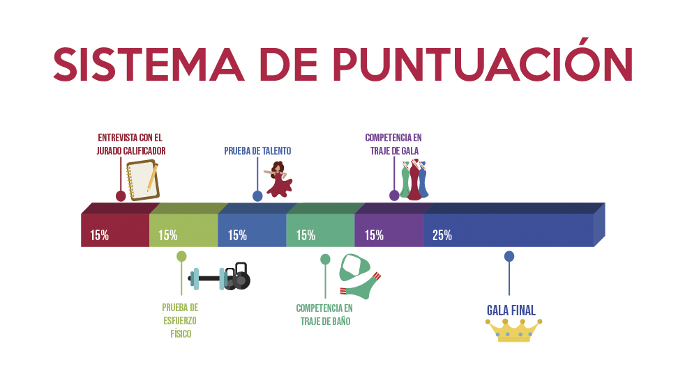 Gráfico que muestra el sistema de puntuación en el certámen internacional.